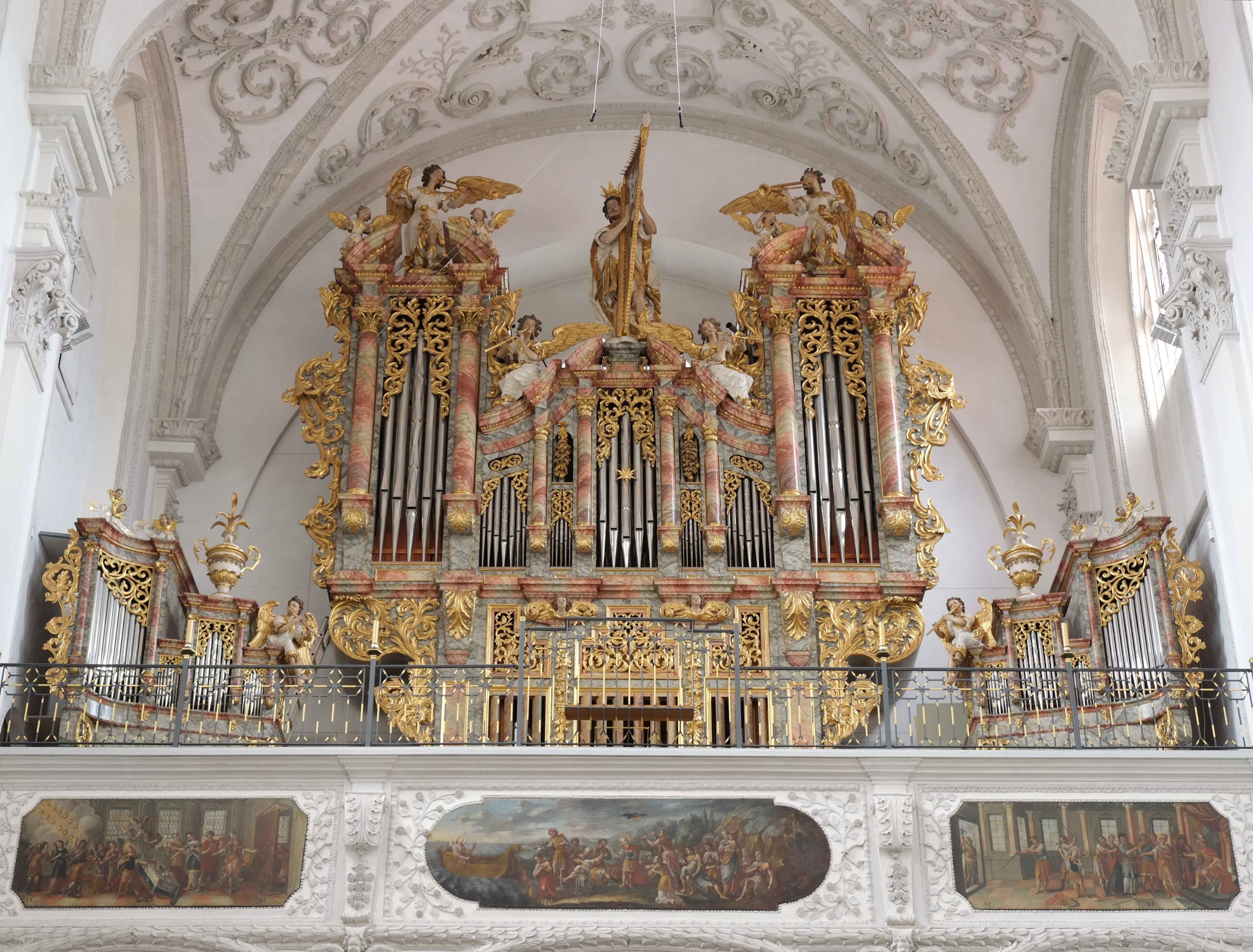 Stadtpfarrkirche Mariä Himmelfahrt in Landsberg am Lech (Bayern, Deutschland)